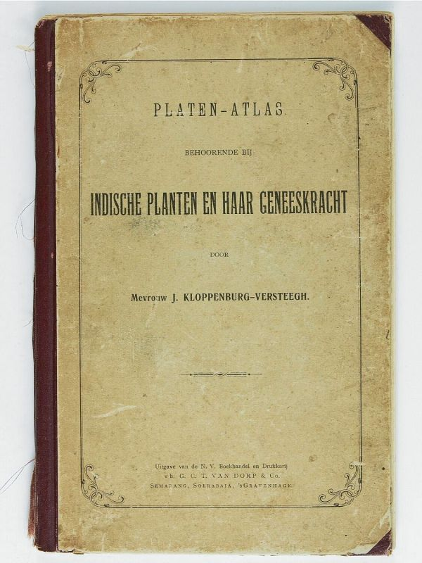 Boek. Platen-Atlas behorende bij 'Indische planten en haar geneeskracht' door Mevrouw J. Kloppenburg-Versteegh. Uitgave van de N.V. Boekhandel en Drukkerij v/h. G.C.T. van Dorp & Co. Semarang, Soerabaja, 's-Gravenhage. Het boekje bestaat uit een kartonnen kaft met rode rug en hoekjes. Gebruikt exemplaar: bij het openslaan is de gescheurde binnenkant zichtbaar. De inhoud bestaat uit een inhoudsopgave en vervolgens 40 platen, 'Ad nat. et phot. lith.', van Indische planten met blad, bloeiwijze, wortels, vruchten e.d. van in totaal 131 planten. De litho's zijn van de fa. P.W.M. Trap impr. Leiden. Mw. Ziesel heeft met ballpoint haar naam verschillende malen in dit boekje geschreven.. Platen-Atlas behorende bij Indische planten en haar geneeskracht